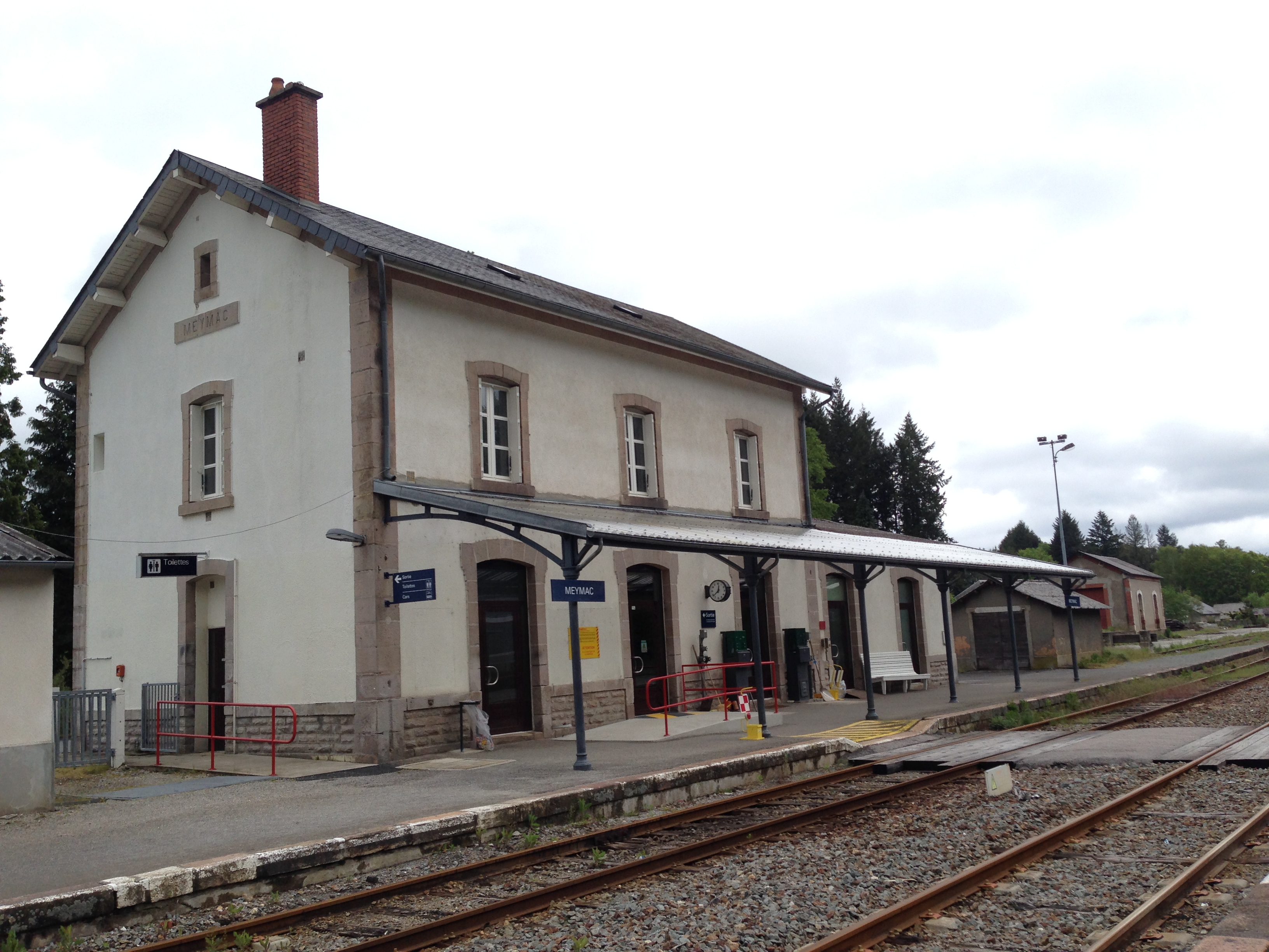 Gare de Meymac-2014